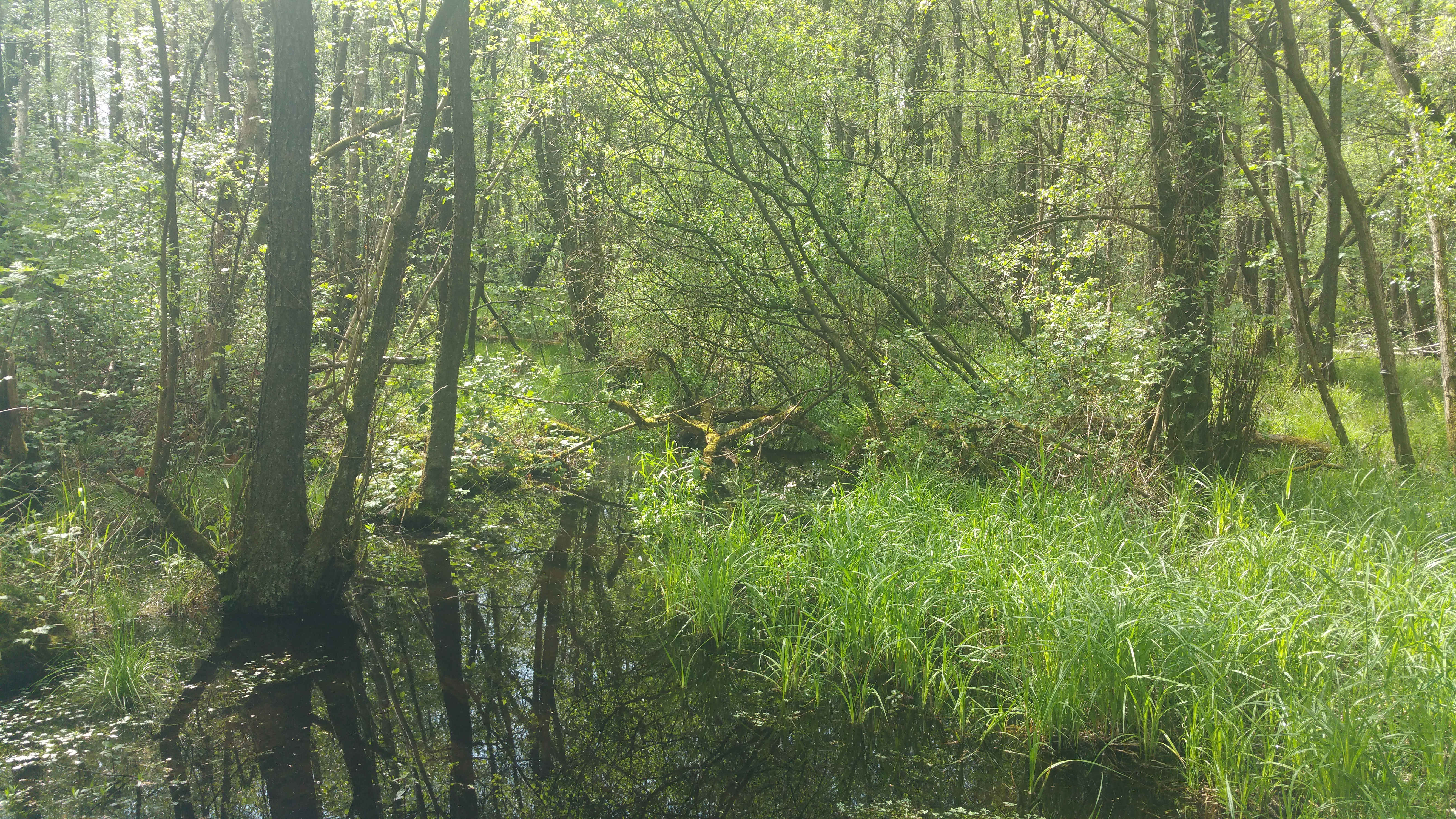 Sumpf